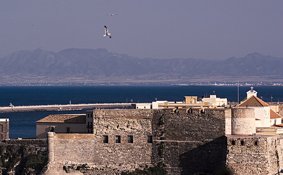 Y al fondo, Marruecos....